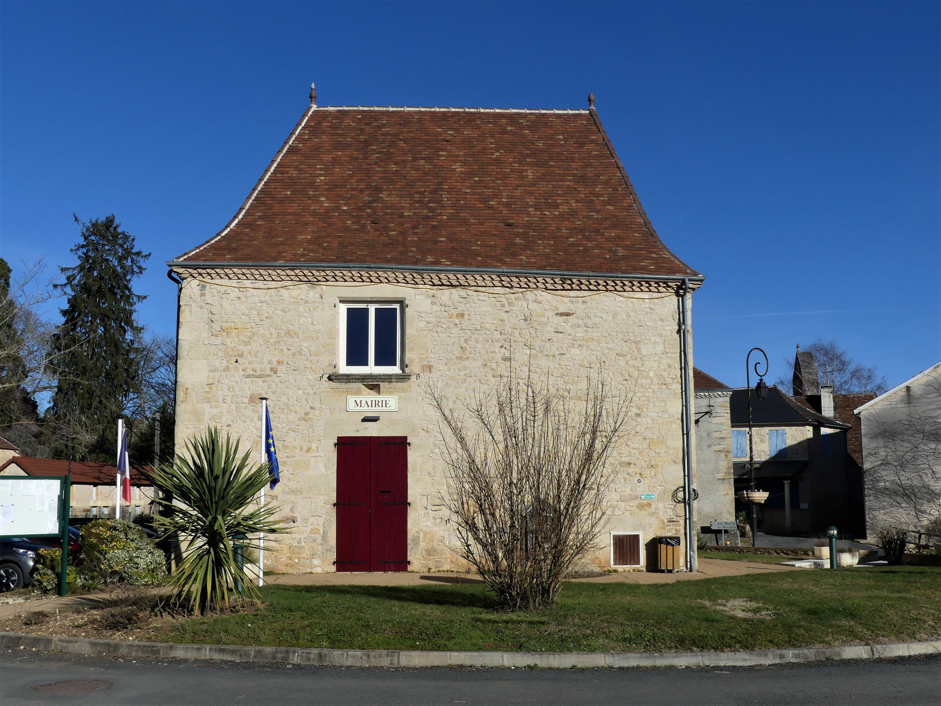 La mairie d'Anlhiac, Dordogne, France.